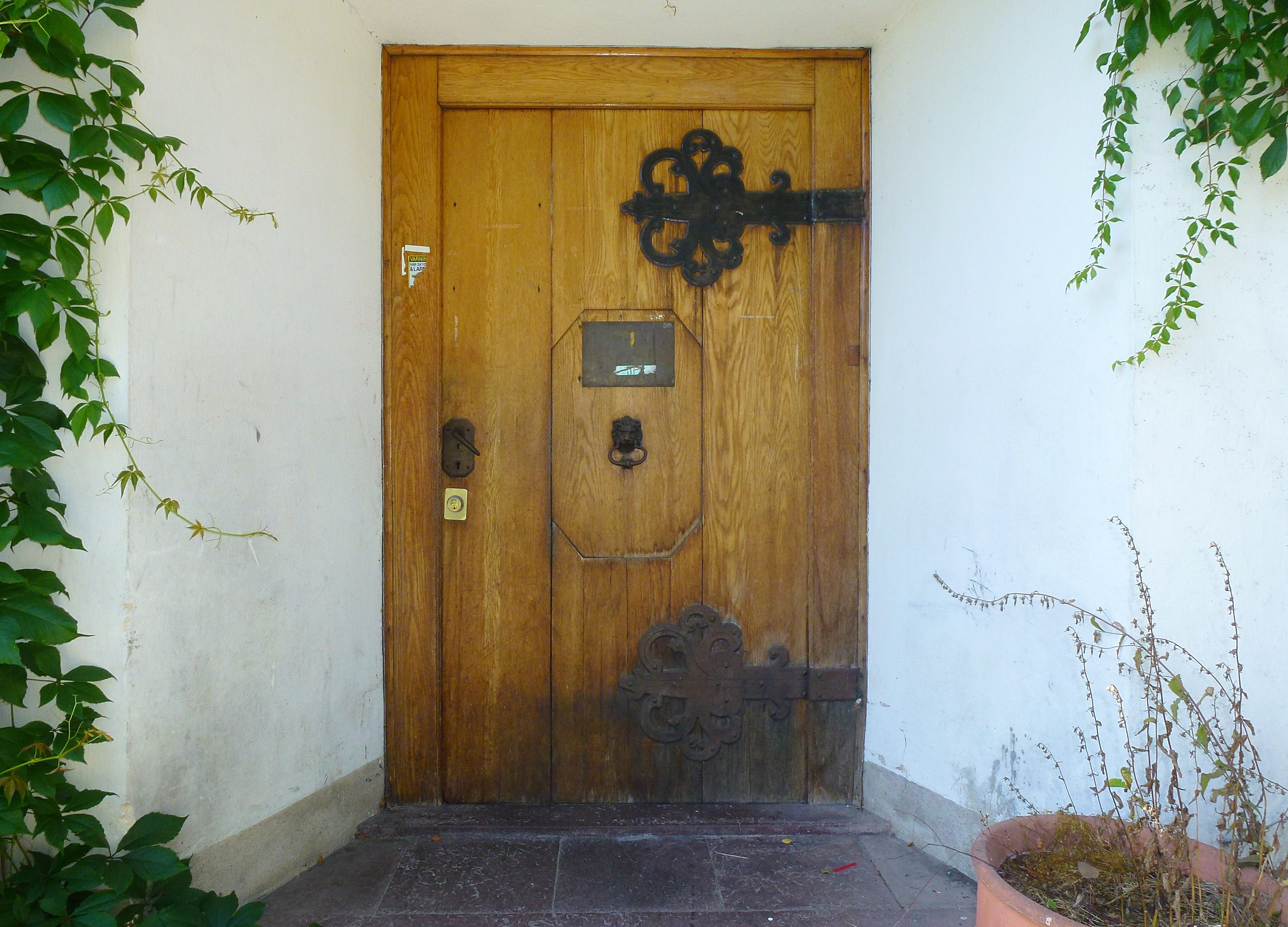 Villa Strandvik i Gustavsberg, arkitekt Ferdinand Boberg, 1911